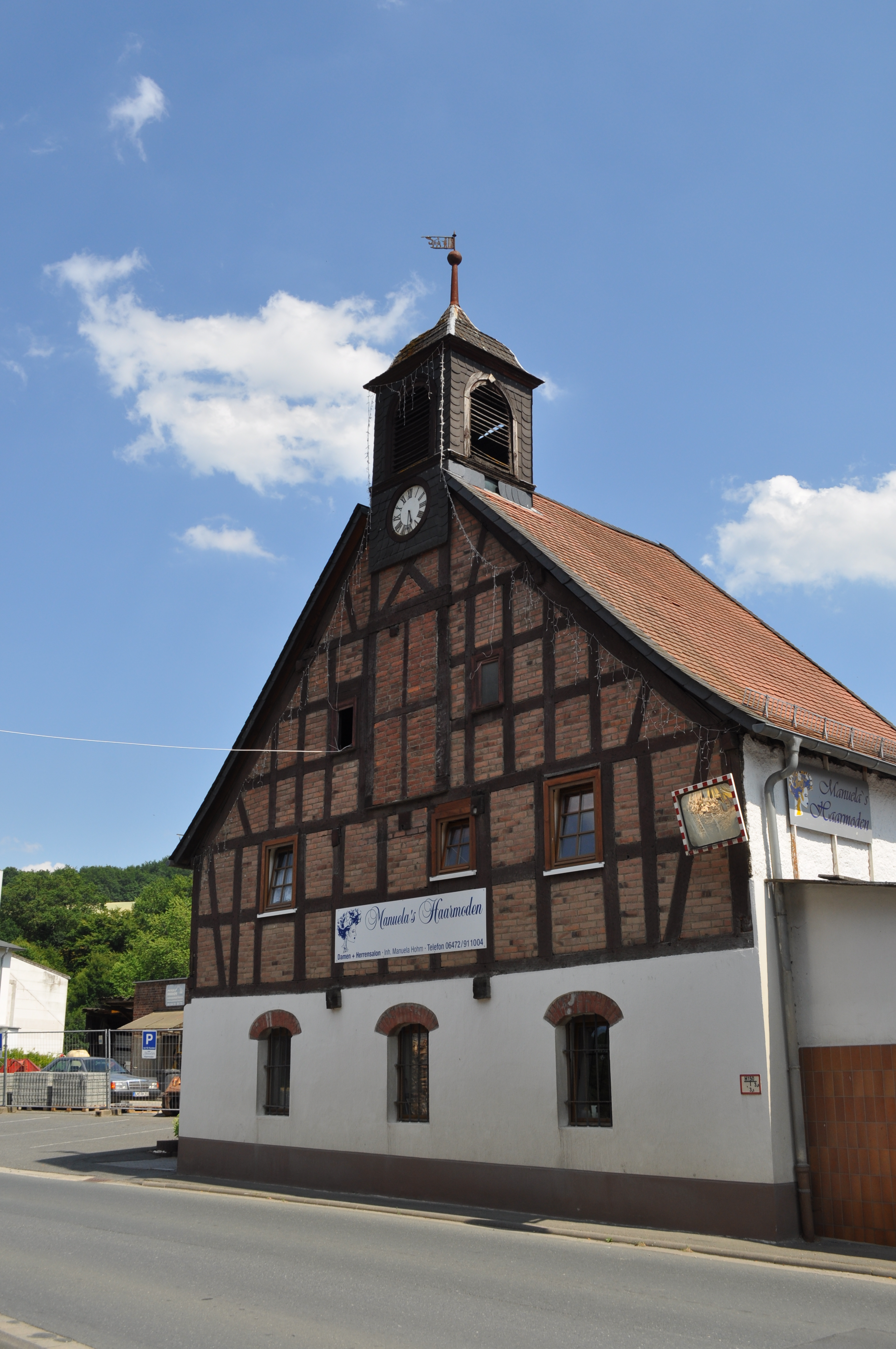 Fachwerkhaus in Audenschmiede. Ehemaliges Verwaltungs- und Speichergebäude, Buderusstraße 12